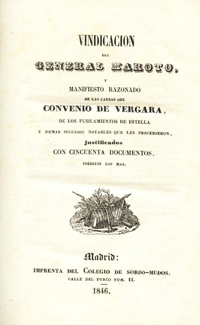 Portada. "Vindicación del general Maroto". Madrid 1846